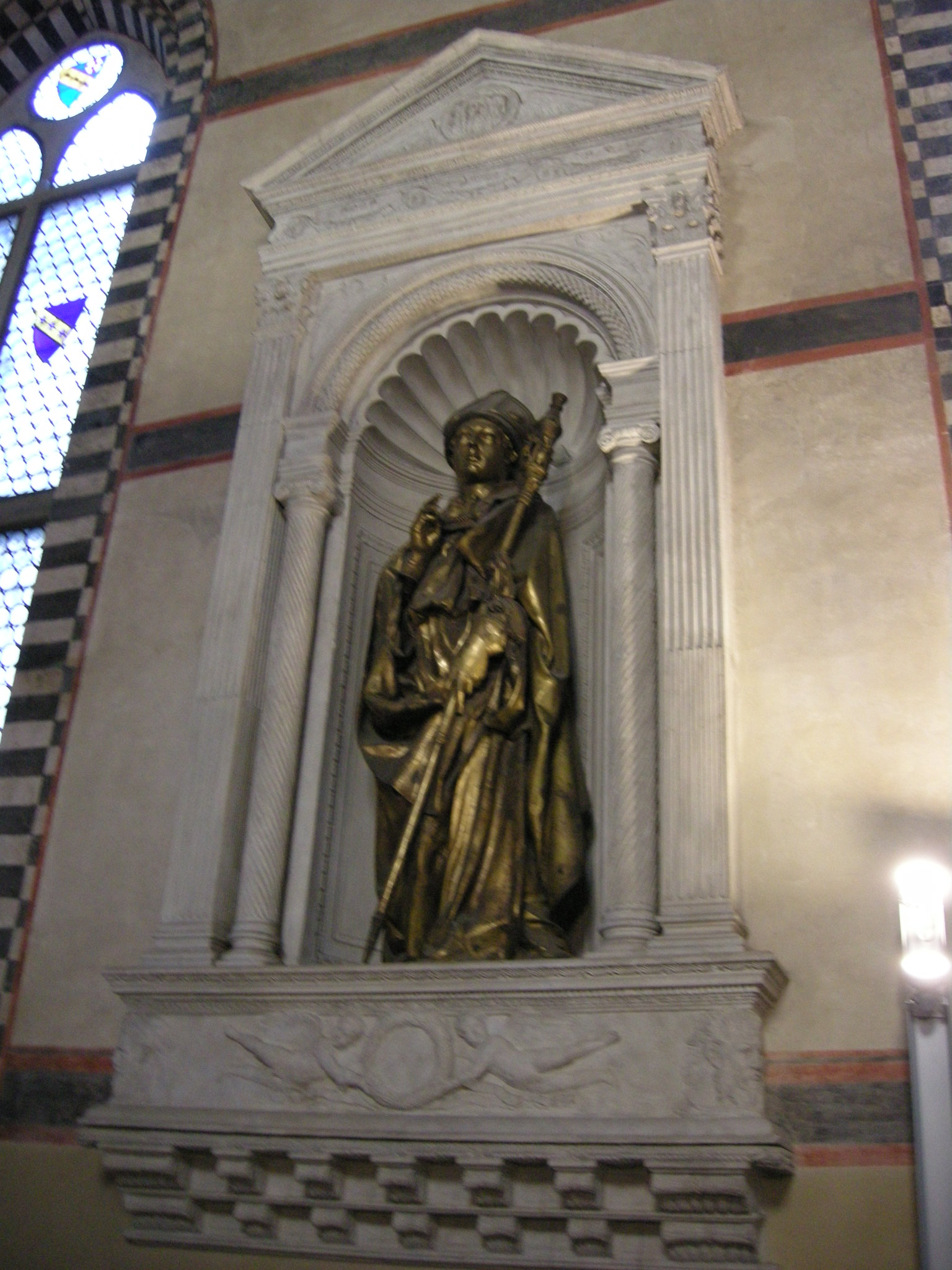 Refettorio santa croce, donatello, san ludovico di tolosa